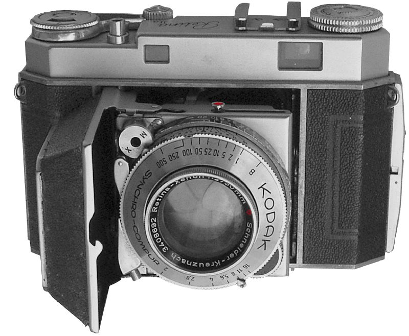 Wenn man keine auswechselbaren Objektive braucht, ist wahrscheinlich die IIa (Type 016) das schönste der Retina-Modelle. Beschreibung (angelehnt an einen zeitgenössischen Prospekt): Die IIa ist mit dem sechslinsigen Schneider-Retina-Xenons f:2/50mm (oder auch mit einem Rodenstock-Retina-Heligon f:2/50mm ähnlicher Konstruktion) ausgerüstet. Der Synchro-Compur-Verschluss (für 9 Geschwindigkeiten von 1 bis 1/500 Sekunde und Zeitaufnahmen) erlaubt als vollsynchronisierter Verschluss auch bei den kürzesten Zeiten die Verwendung von Elektronenblitzgeräten. Die Skalen für die Verschlusszeiten, Blenden und Entfernungen liegen sehr übersichtlich und sind selbst mit dicken Handschuhen bequem zu bedienen. Die letztgenannte Skala enthält Einstellmarken für Schnappschuss- und Infrarot-Aufnahmen. Die für jede Aufnahme mögliche Tiefenschärfe ist mit einem Blick ablesbar. Der Schnellaufzug transportiert mit einem einzigen Hebelzug den Film und spannt gleichzeitig den Verschluss, Doppelbelichtungen und sog. Leerschaltungen werden so vermieden, Aufnahmen in schnellster Folge ermöglicht. Ein im Hebel eingebauter automatischer Bildzähler rückt gleichzeitig bildweise vor und gibt immer die Zahl der noch verfügbaren Aufnahmen an. Unmittelbar neben dem Schnellaufzug liegt der Auslöseknopf, bei dem ein kurzer Auslöseweg mit spürbar weichem Druckpunkt einen weitgehenden Schutz vor Verwacklungen bietet. Die Retina IIa wurde von 1951 bis 1954 produziert.